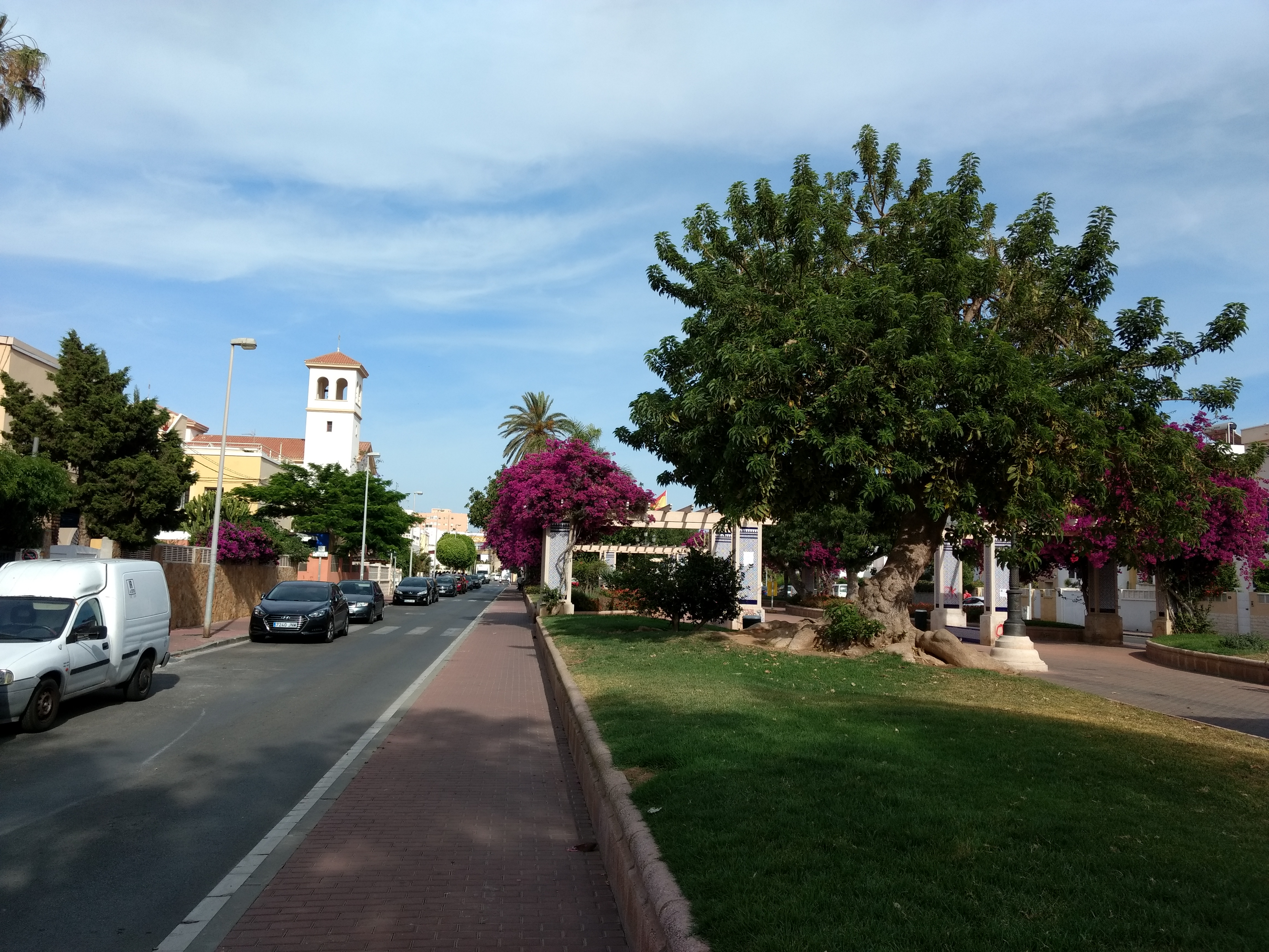 Ciudad Jardín, Almería, 04007